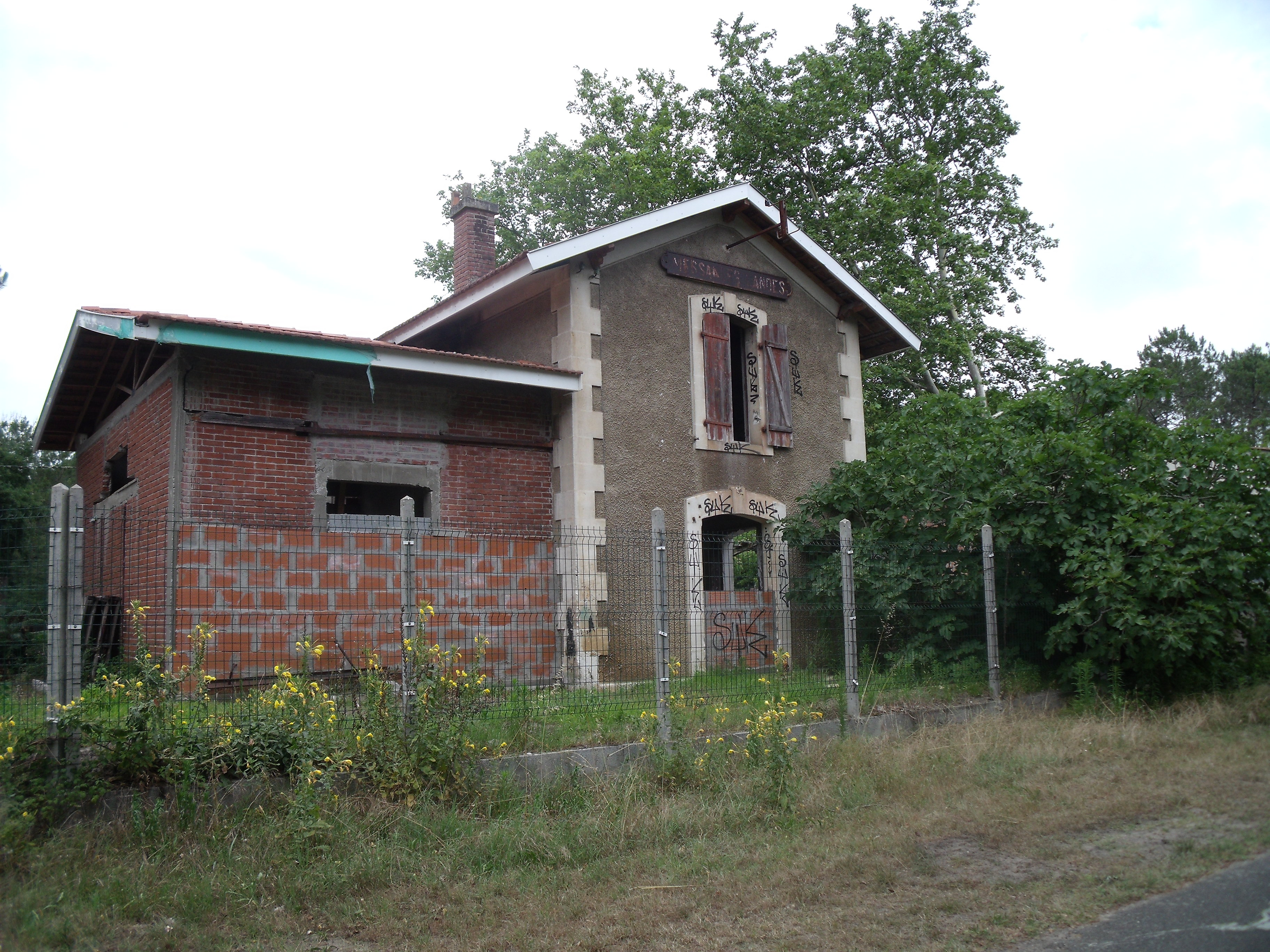 La gare désaffectée de Messanges, Landes.